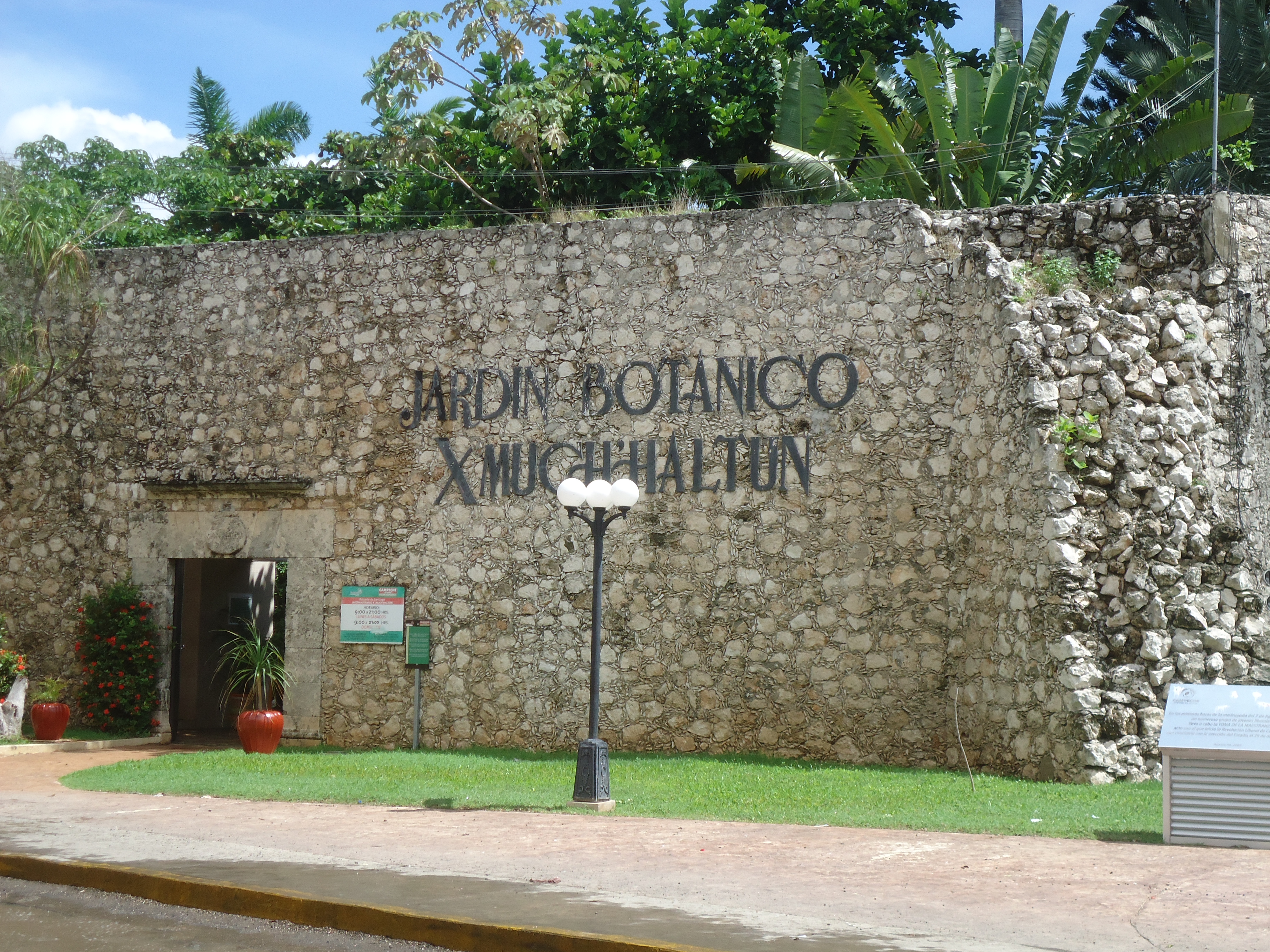 Fotografía del Baluarte de Santiago, San Francisco de Campeche, Campeche